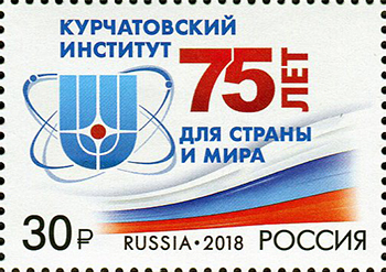 Почтовая марка России, выпущенная 12 апреля 2018 года, посвященная 75-летию Национального исследовательского центра «Курчатовский институт». На марке изображён логотип, созданный к годовщине. Дизайнер — А. Поварихин. Номер по каталогу — 2336.